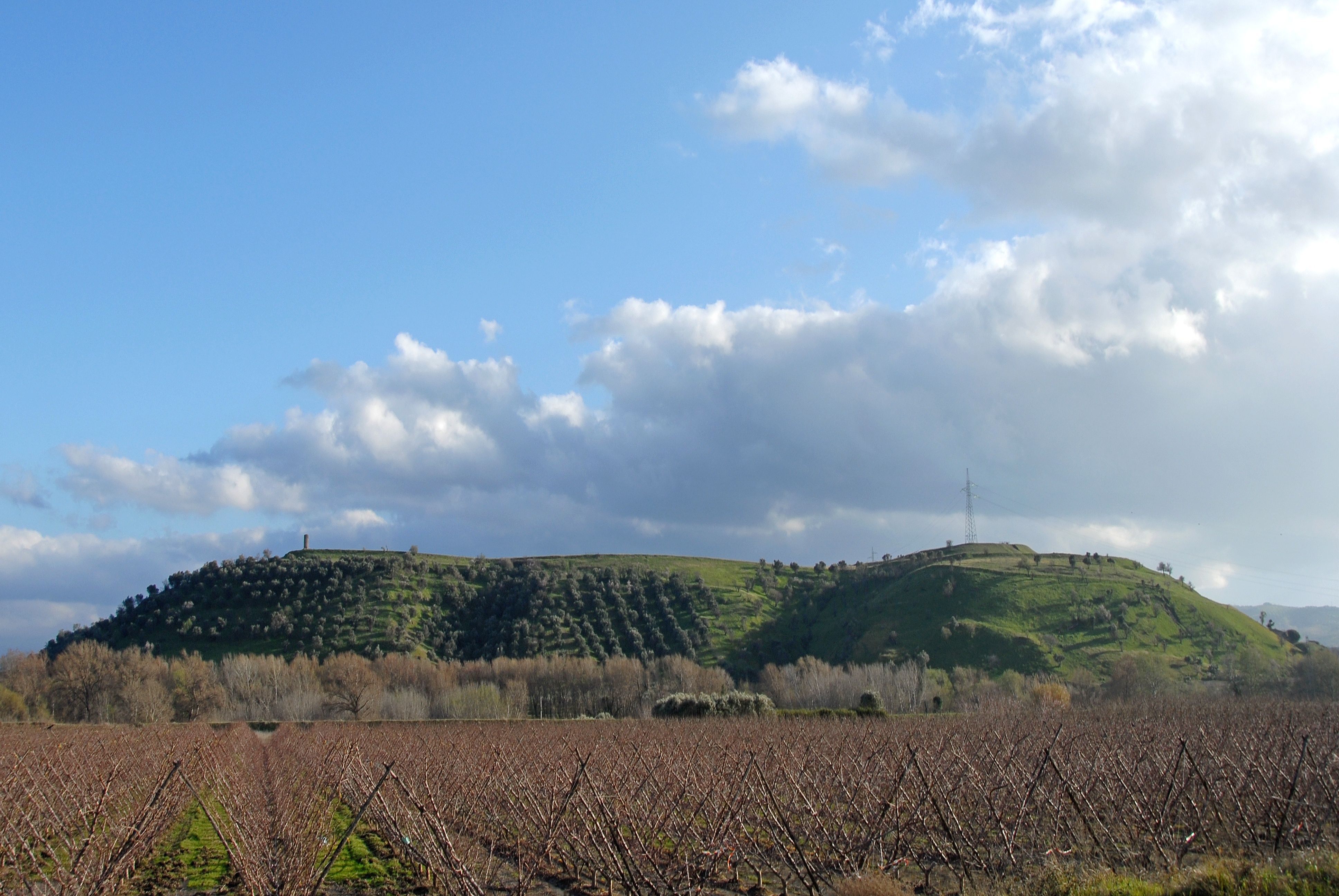 Parco Archeologico